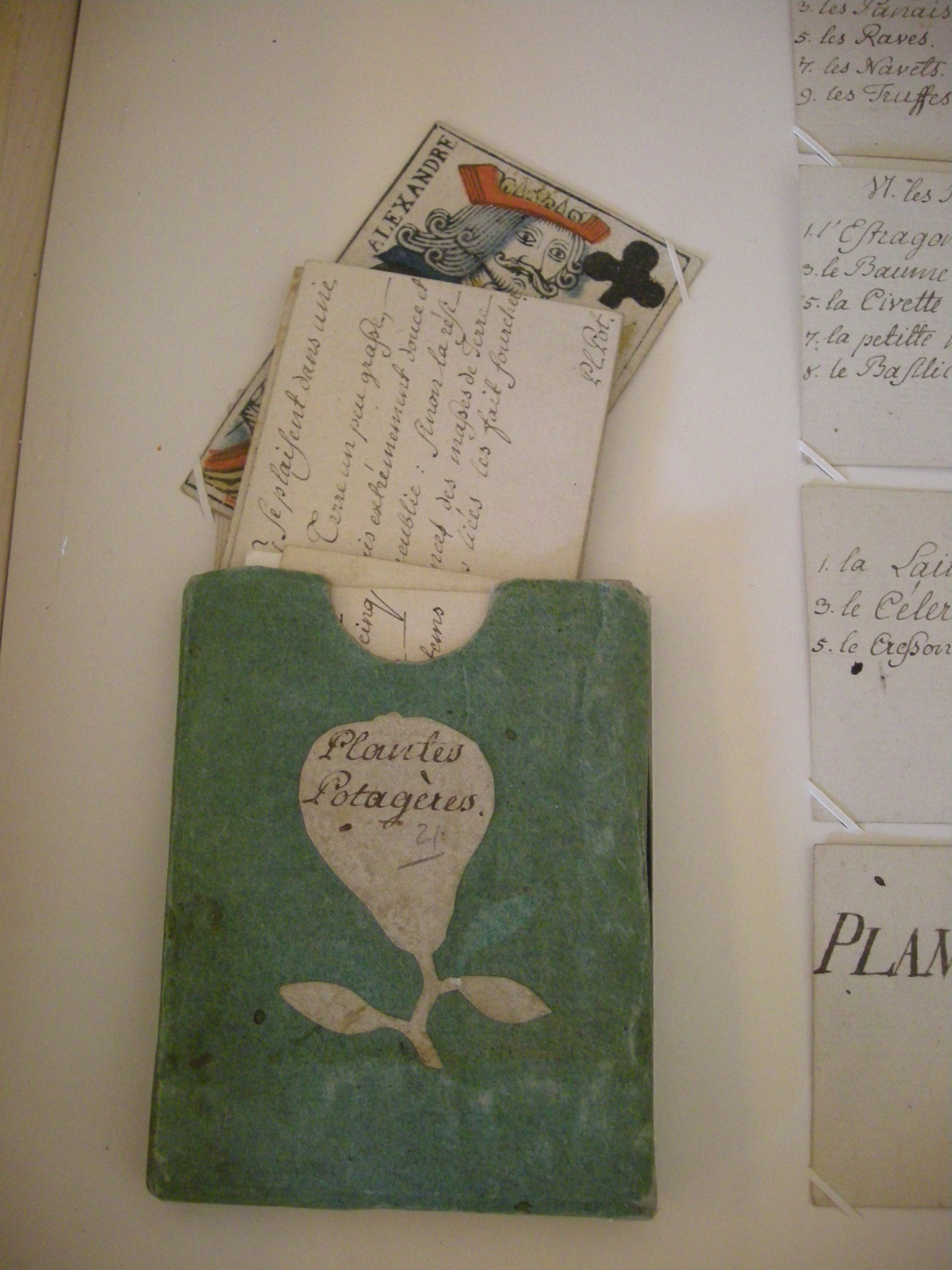 Jeu de cartes pédagogique (botanique) conçu et annoté par le pasteur Jean-Frédéric Oberlin - Musée Jean-Frédéric Oberlin, Waldersbach (67)